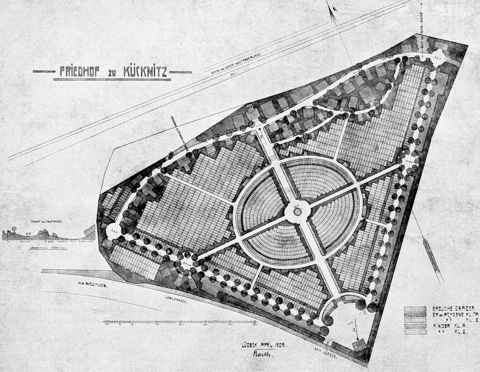 Erwin Barth: Plan des Friedhofs zu Kücknitz (Friedhof Waldhusen) 1909, aus: Die Die Gartenkunst 11 (2009), S. 211 (Digitalisat im Internet Archive)